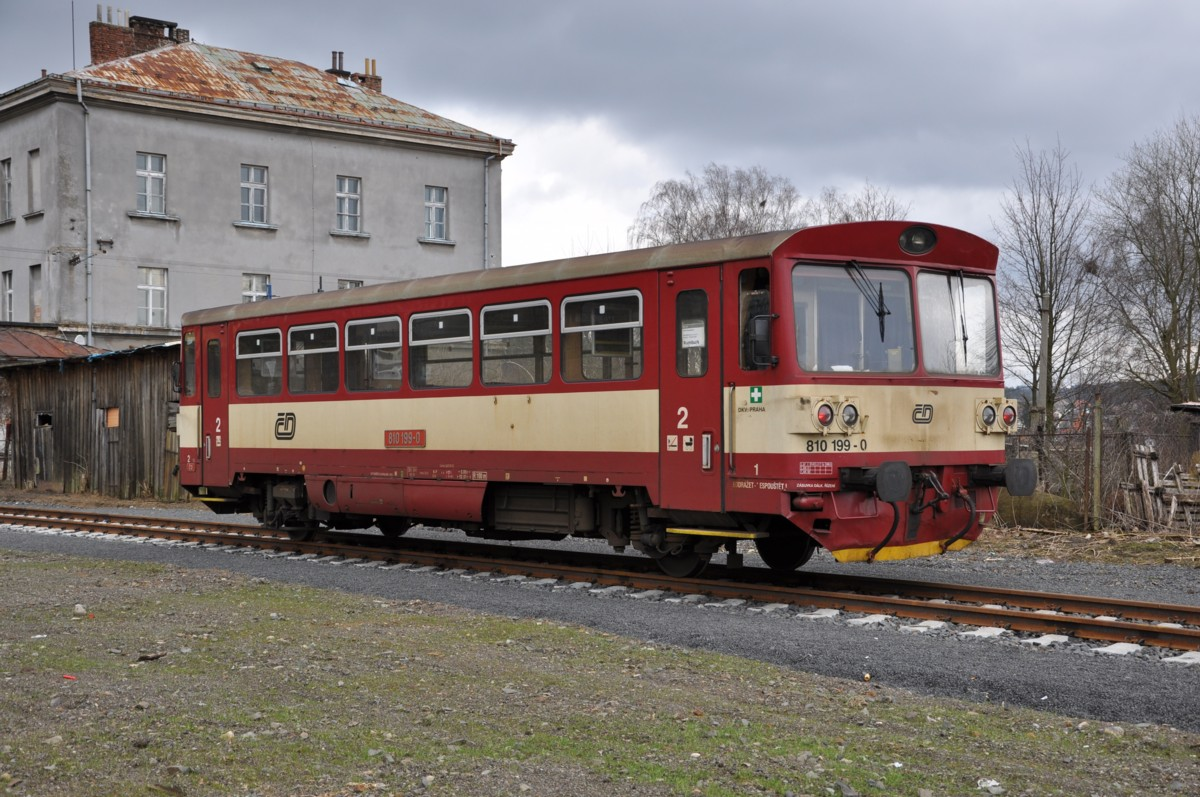 Triebwagen Baureihe 810 im Bahnhof Dolní Poustevna, Tschechien